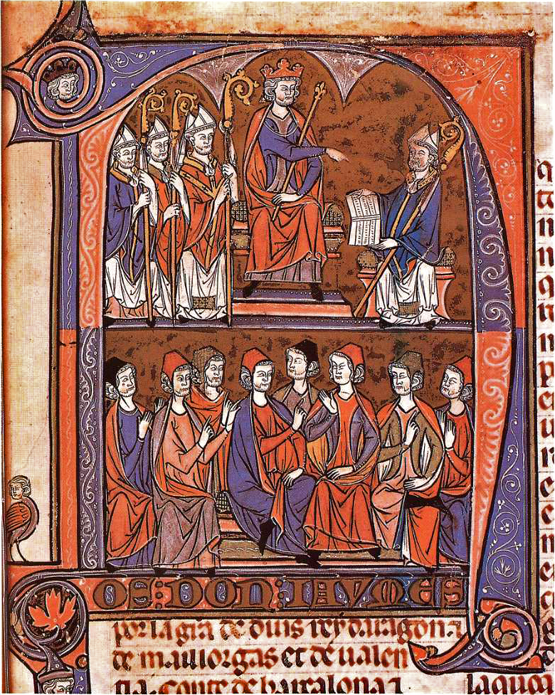 Vidal mayor. Incipit. (Primera compilación del Fuero de Aragón, realizada por el obispo de Huesca Vidal de Canellas en 1247). Jaime I de Aragón recibe del obispo y jurista Vidal de Canellas la compilación de los Fueros de Aragón ante otros magnates eclesiástico. En el plano inferior, otros ricos hombres y magnates de la curia familiar departen animadamente. Texto: «Nos, don Iavmes, por la g[rat]ia de Dius rey d'Aragón et de Malliorgas et de Ualentia, conde de Barcalona et [...]»